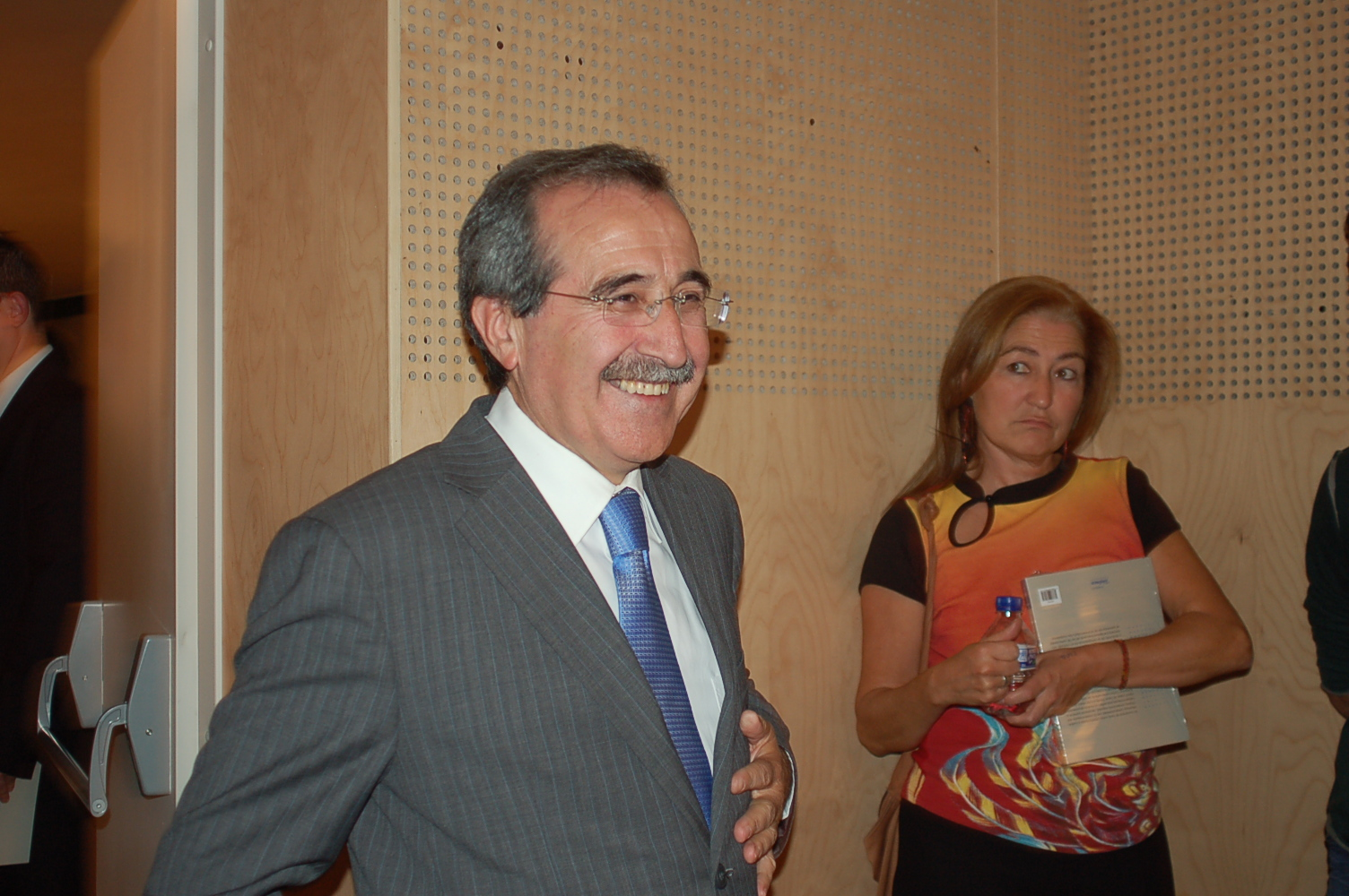 SIIE 2008. Nazioarteko simposiuma hezkuntz teknologiaz. Salamancako Unibertsitateko Fonseca Ikastetxe Nagusian egina urriaren 1etik 3ra. / Virgilio zapatero, ex Ministro de España. salamana, 2008.